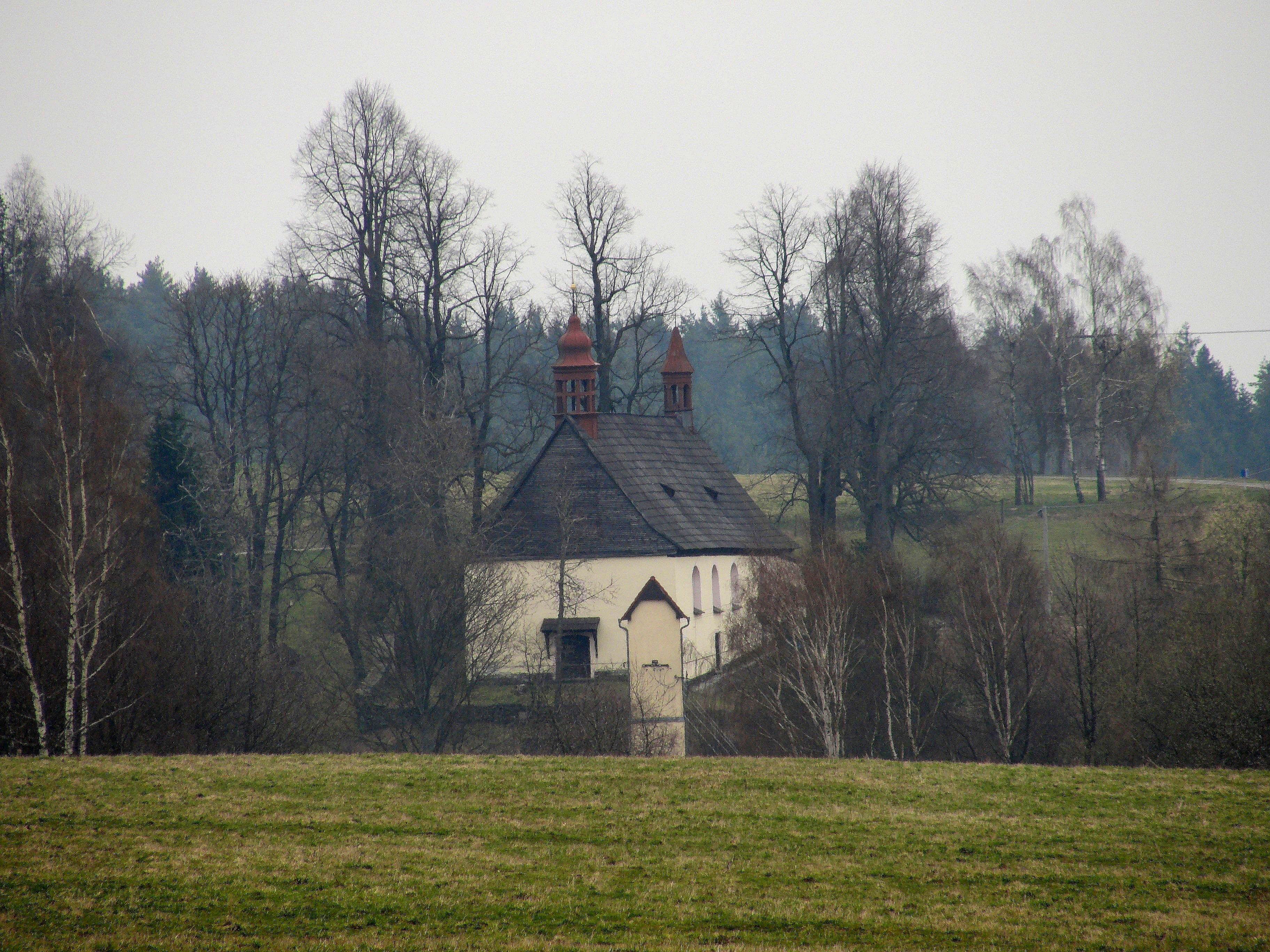 Sněžná (Kraslice) - Kostel sv. Jakuba Většího, kulturní památka